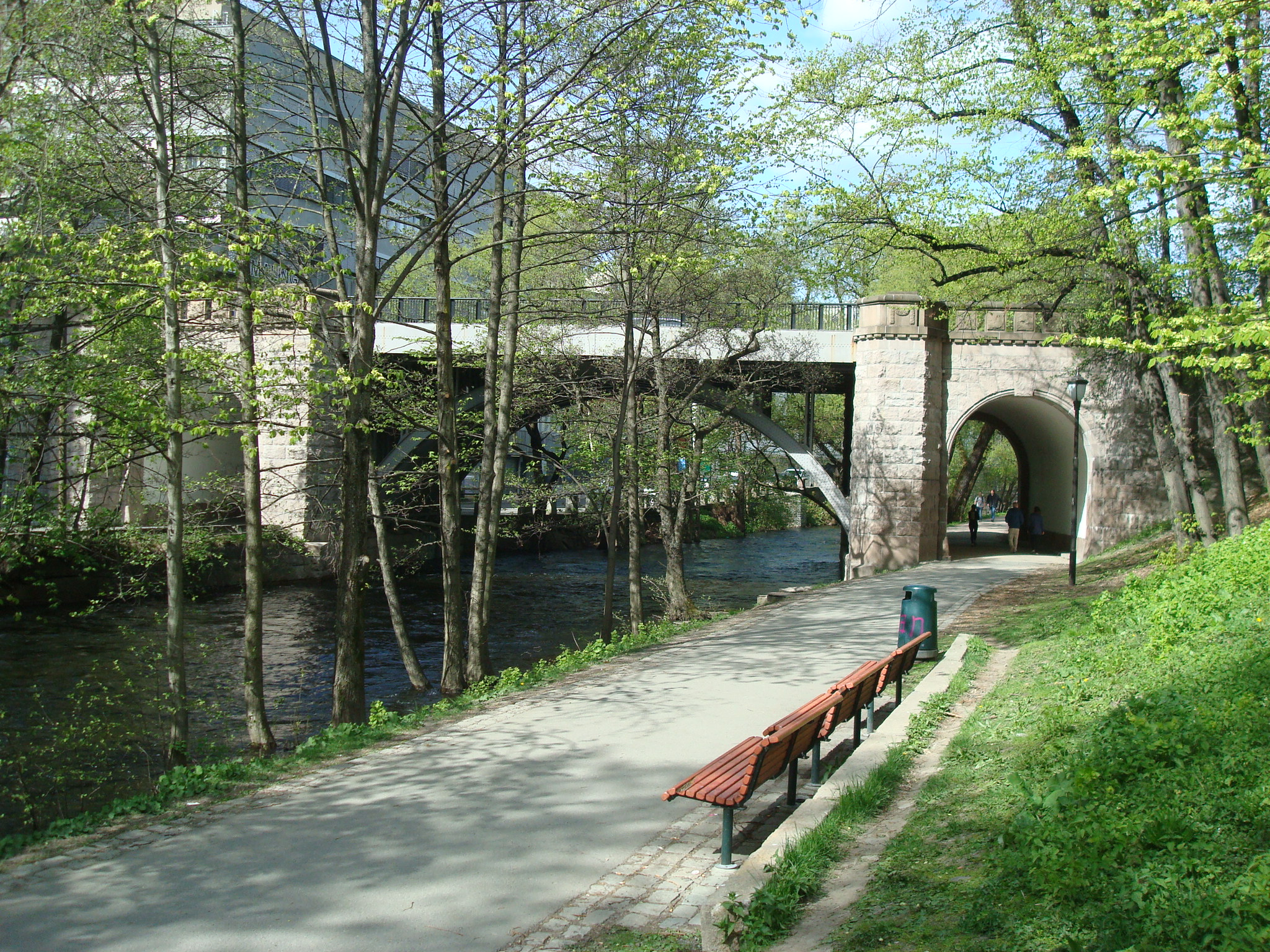 Sannerbrua i Oslo.